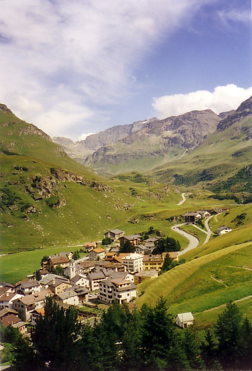 Bivio mit dem Julierpass im Hintergrund.